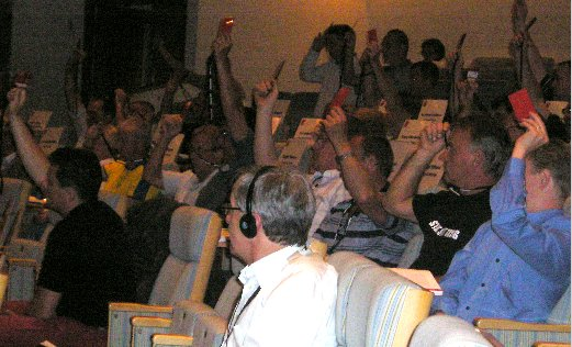 Votación en Asamblea